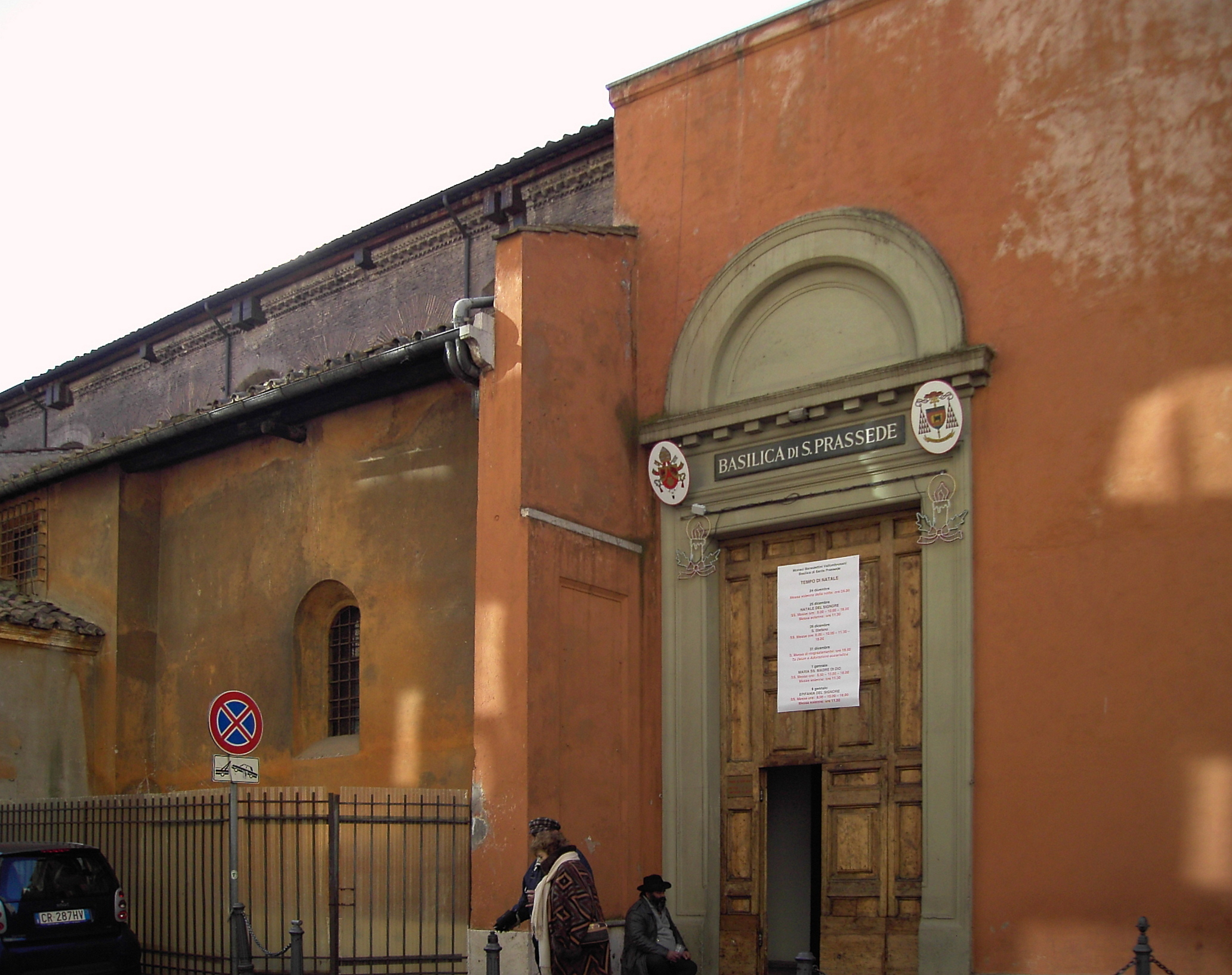 Roma, santa Prassede.prassede